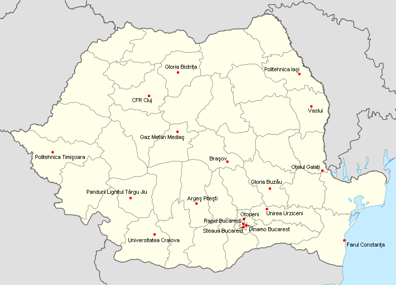 Liste des clubs participants à la Division 1 2008-09.